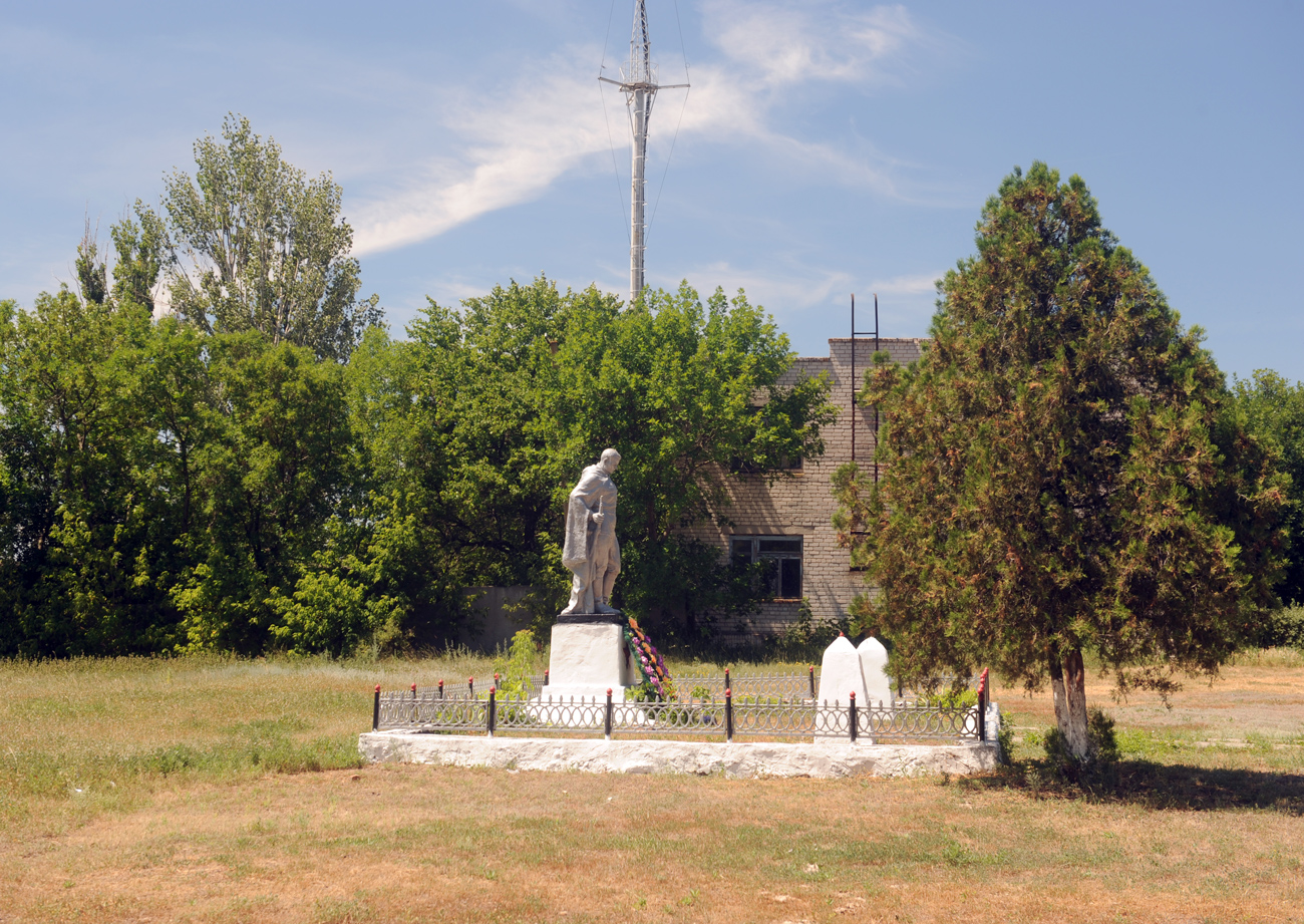 Першопокровка